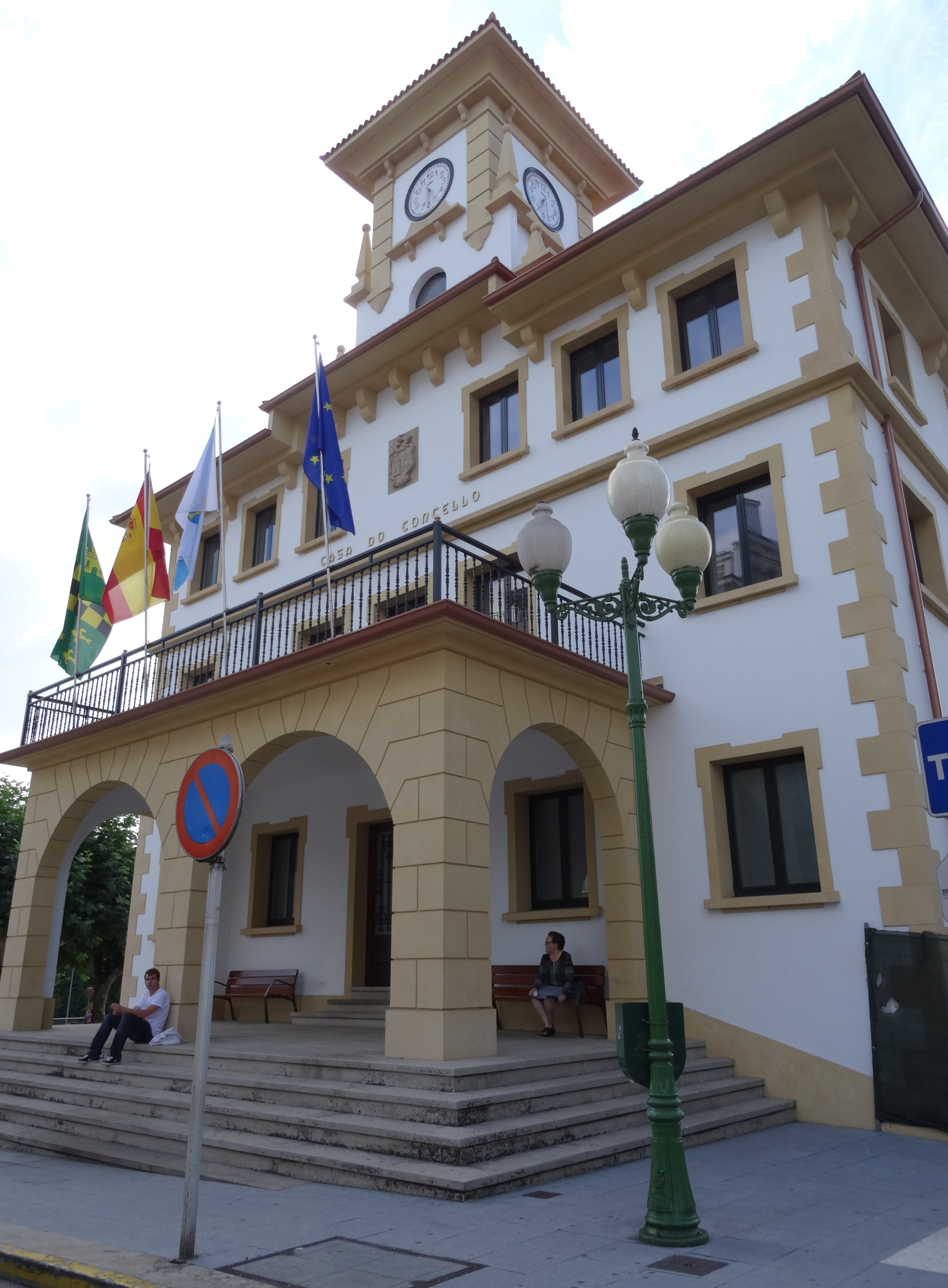 Casa do concello de Ordes.